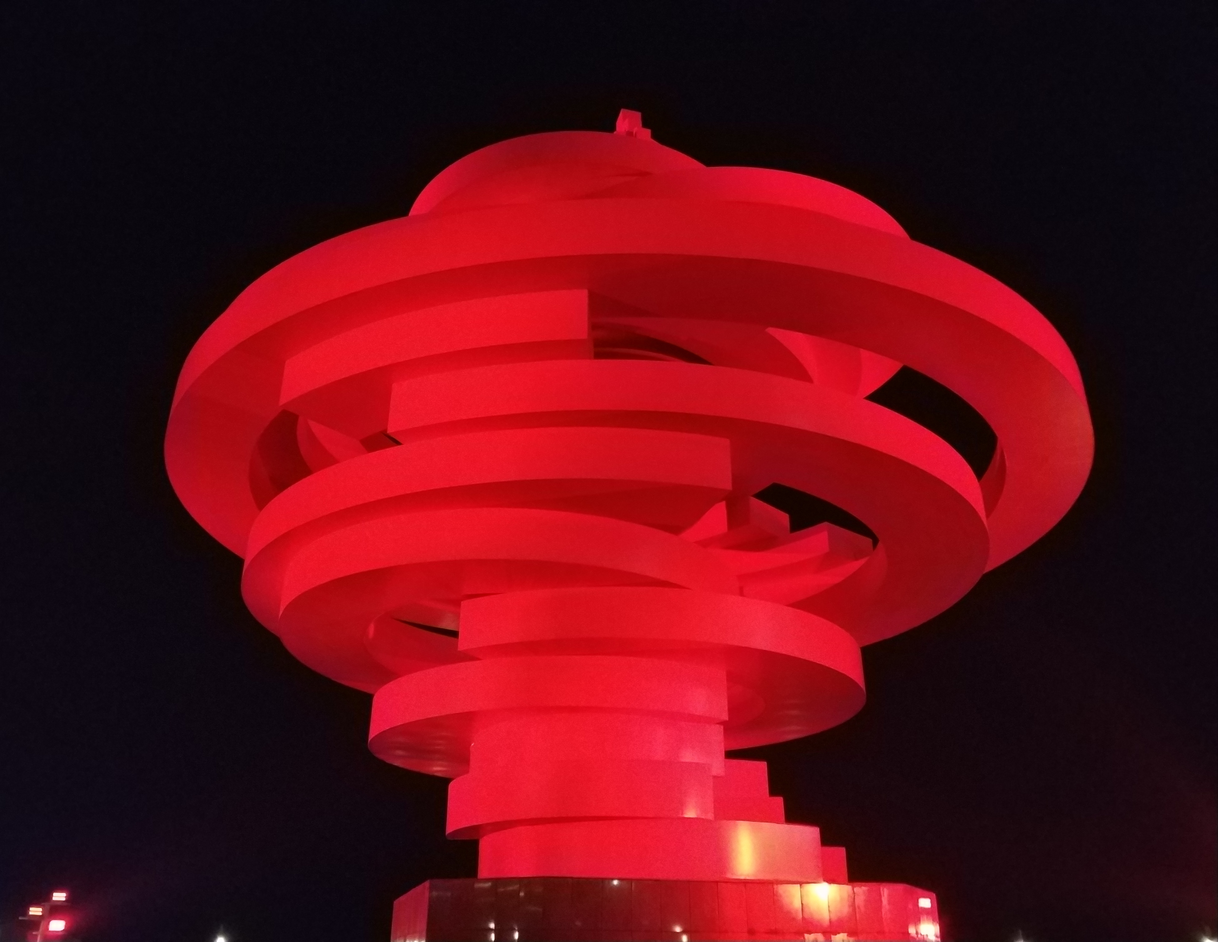 中文（中国大陆）: 2018年12月31日晚的五月的风